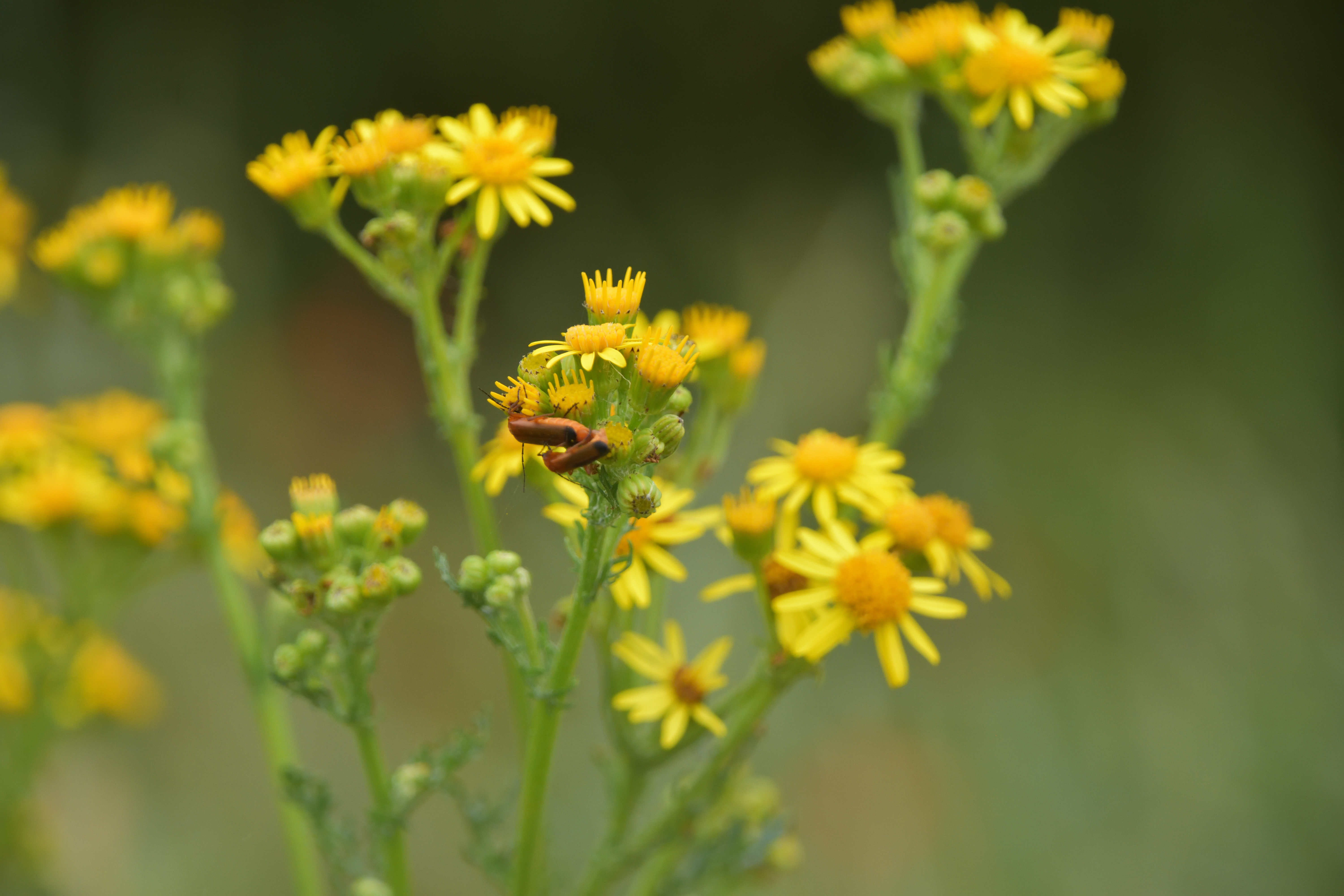 Flora in het Zwin te Knokke